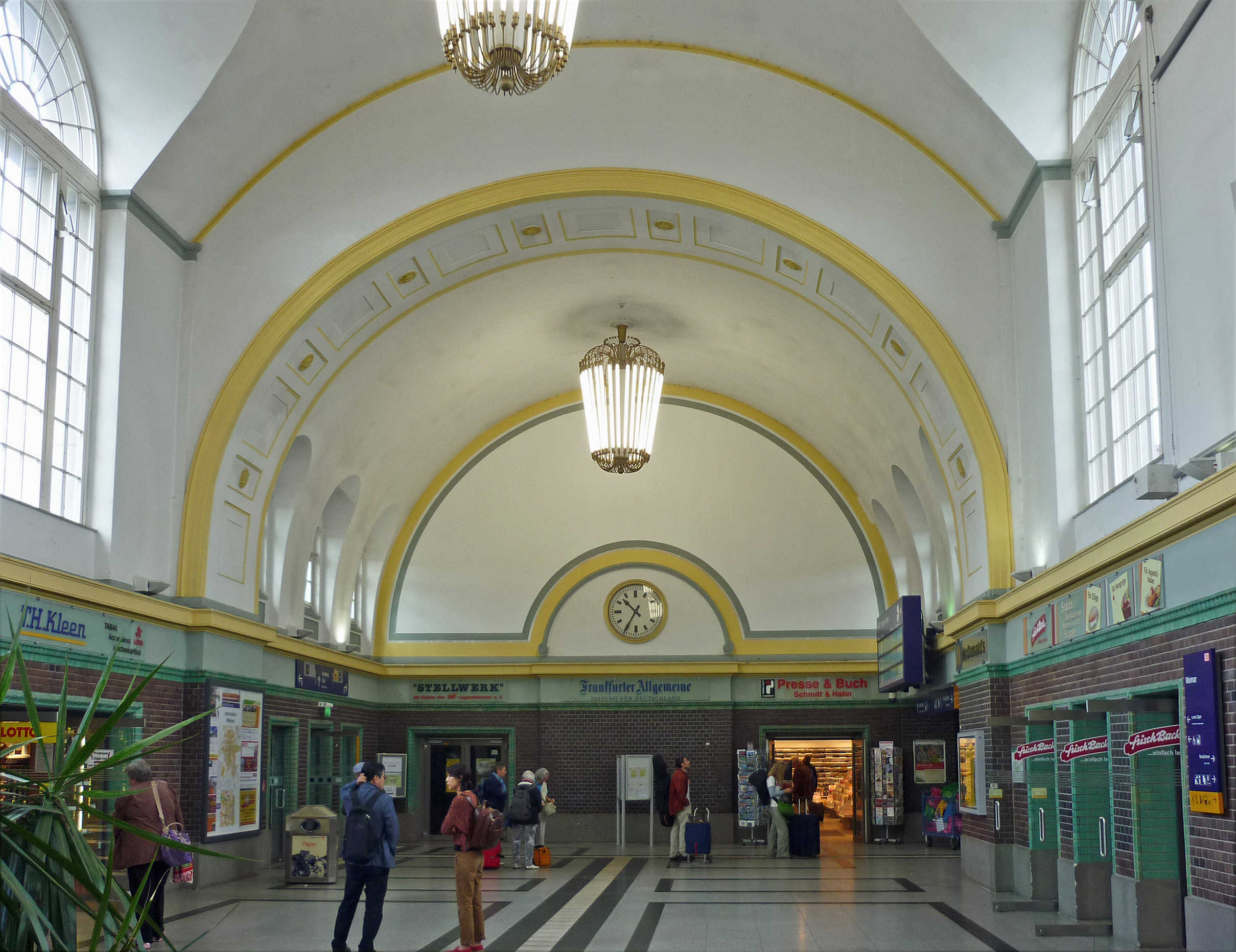 Hauptbahnhof Weimar (Bahnhofshalle)